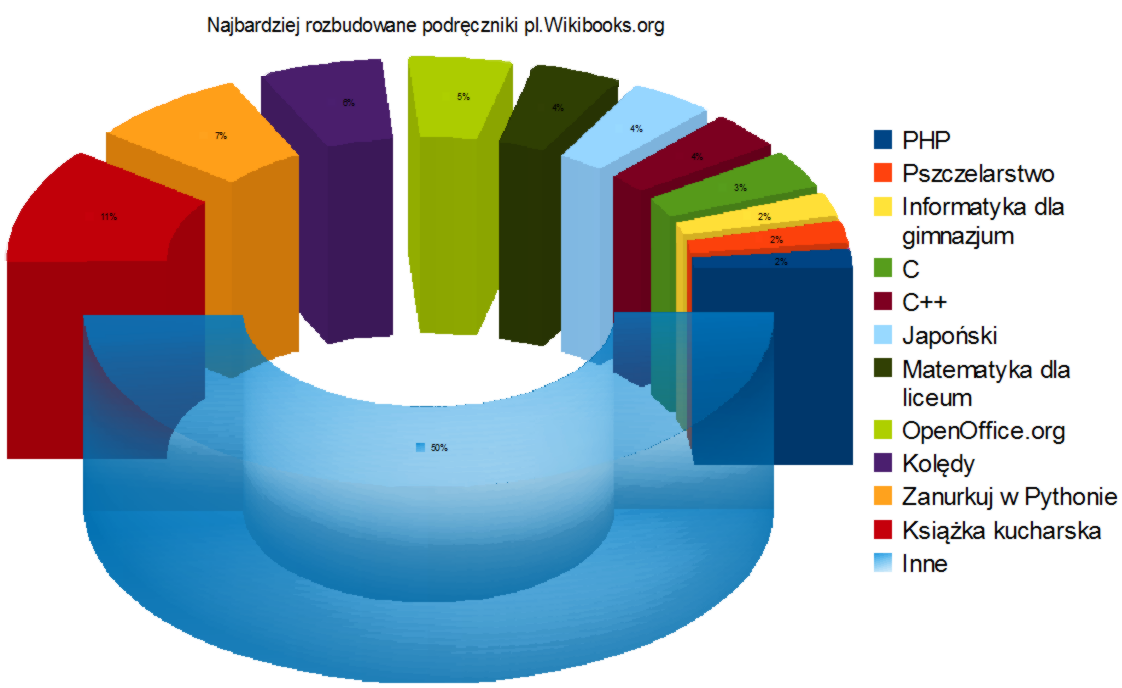 Procentowy udział książek o największej liczbie modułów w projekcie , na dzień 10.07.2008